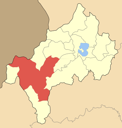 Дем Нестрам на картата на Ном Костур, Гърция. Locator map of Nestoriou municipality (Δήμος Νεστορίου) at Kastoria perfecture, Greece).